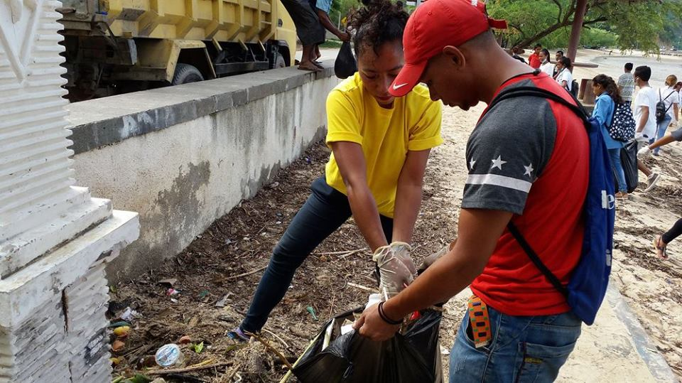 Müllsammelaktion durch Freiwillige am Strand von Areia Branca